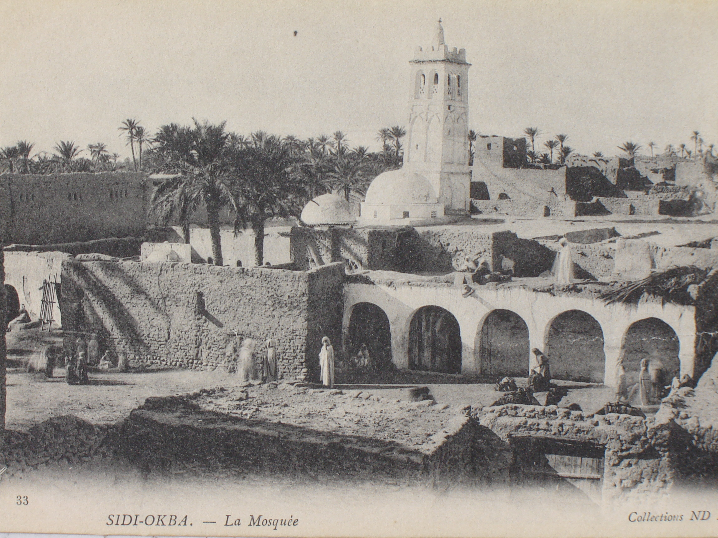 Postcard of Sidi Okba Mosque, Algeria